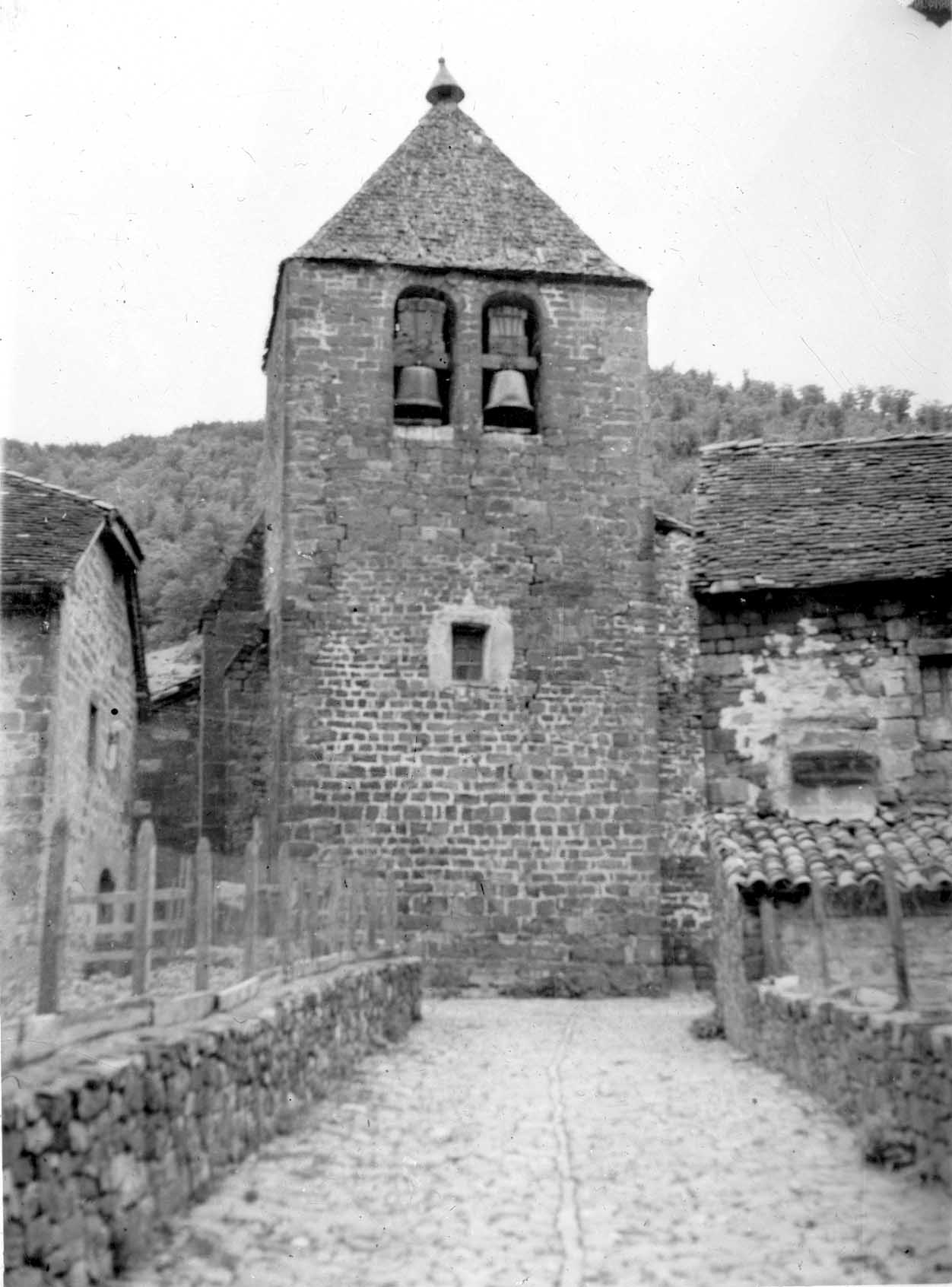 Elizaren ikuspegia.